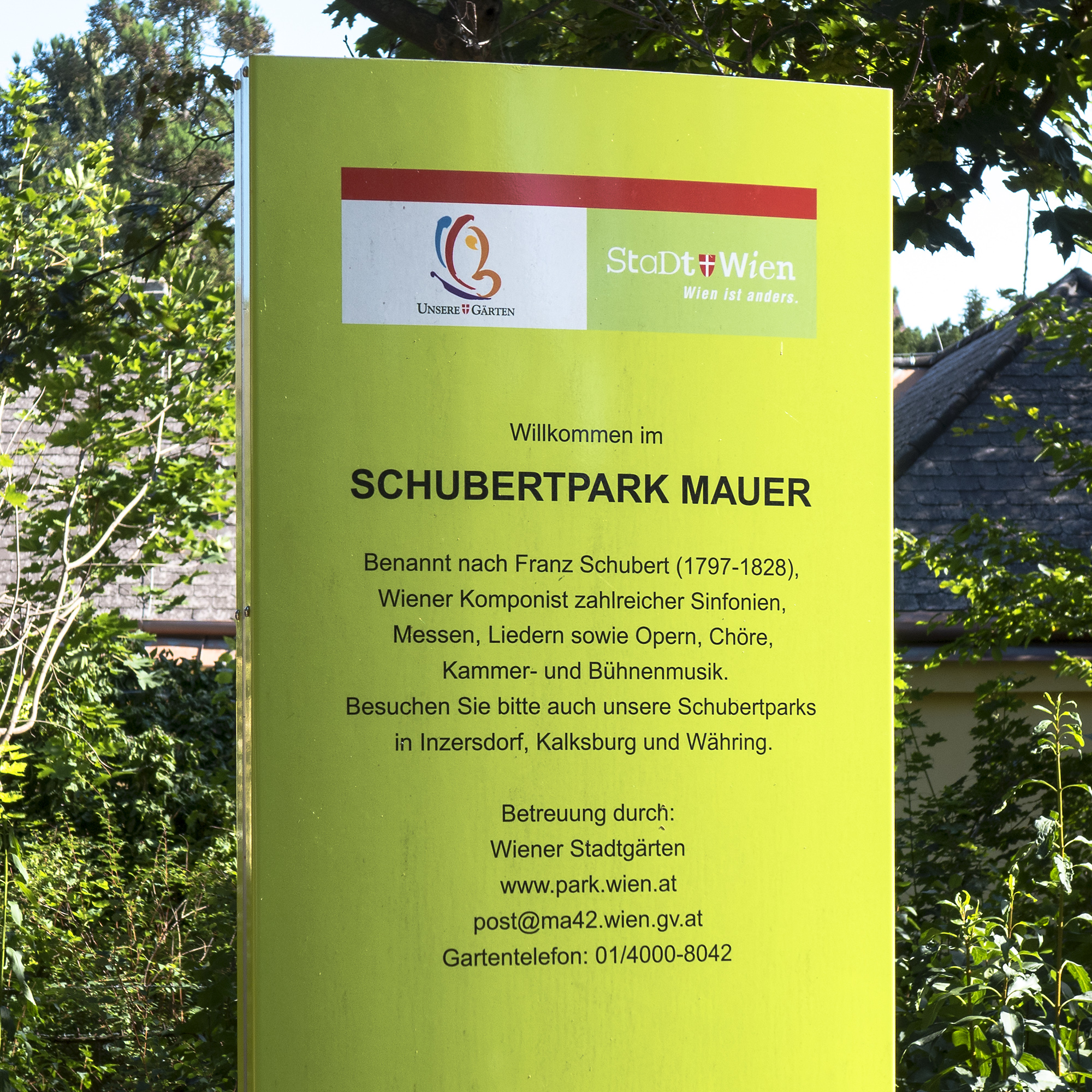 Maurer Schubertpark in Wien 23